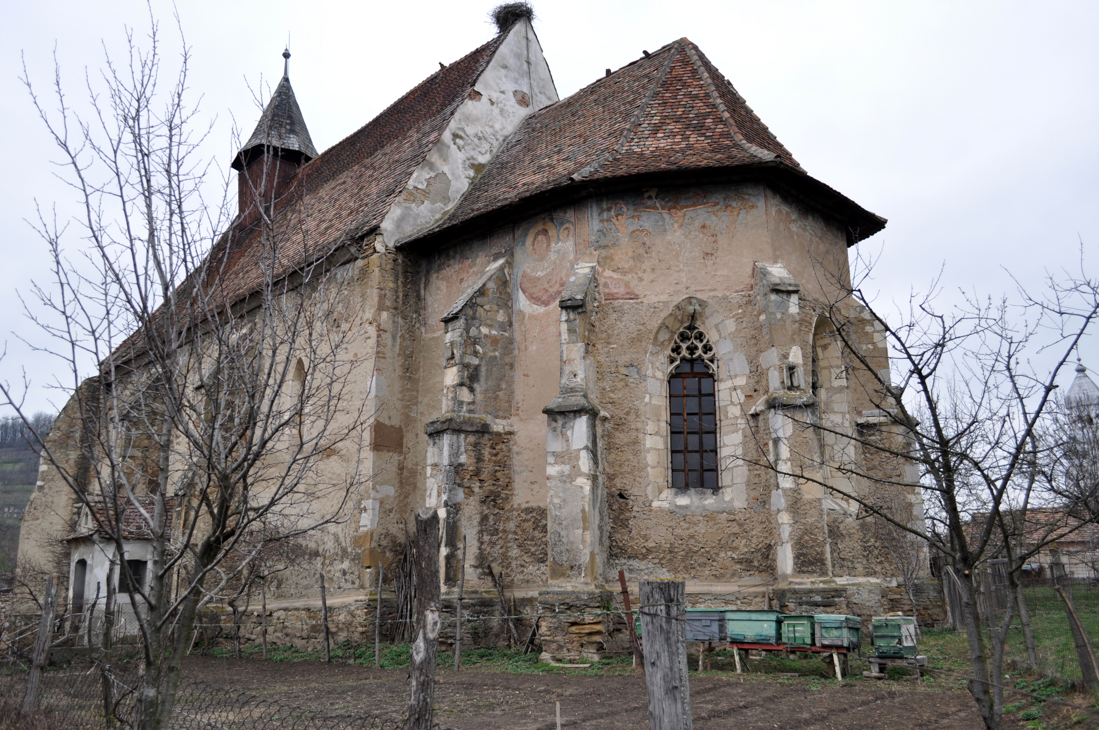 Biserica evanghelică, sat DÂRLOS; comuna DÂRLOS, județul Sibiu